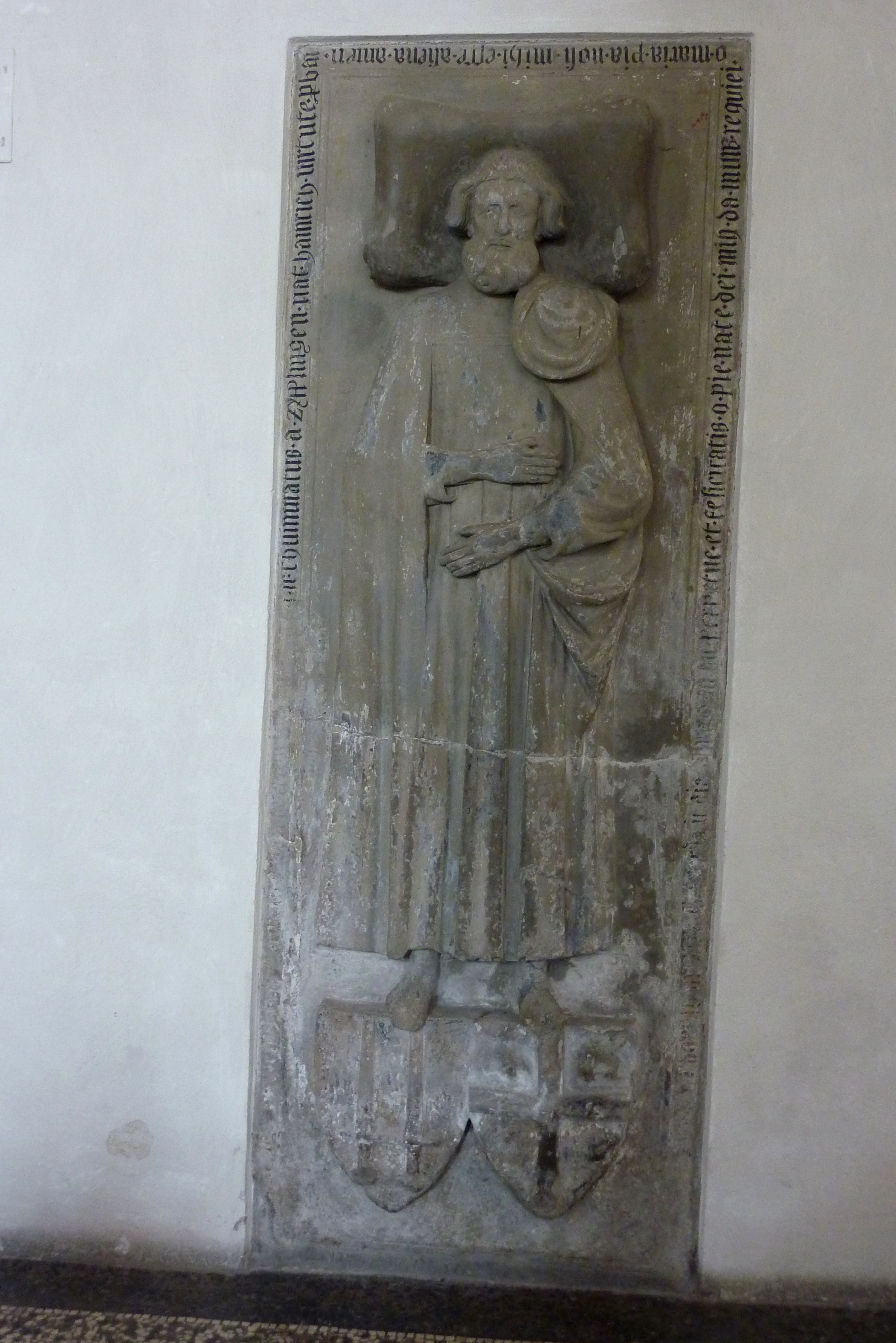 Liebfrauenmünster in Donauwörth im Donau-Ries-Kreis (Bayern), Epitaph Heinrich von Zipplingen († 1346)